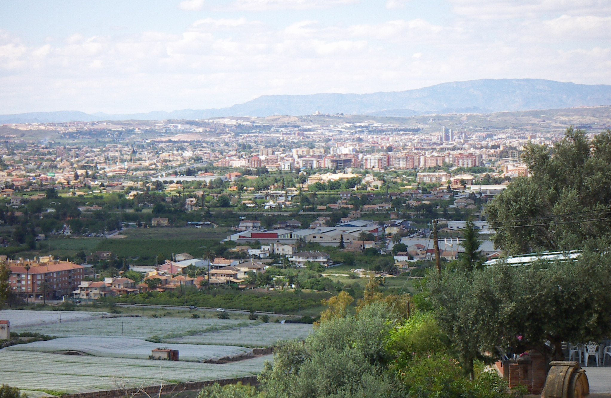 Vega del Segura desde el piedemonte de la Cordillera Sur con la ciudad de Murcia en el centro del valle